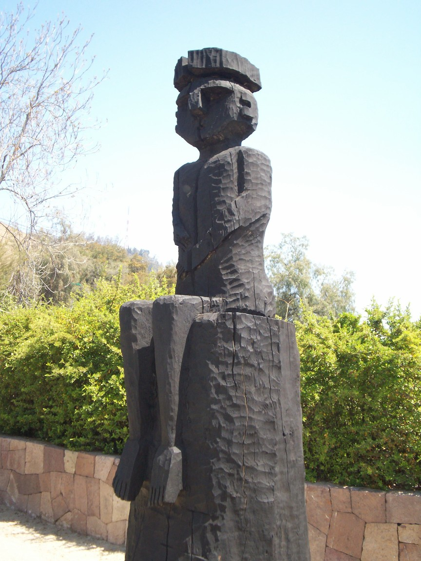 Estatua mapuche representando a un niño.